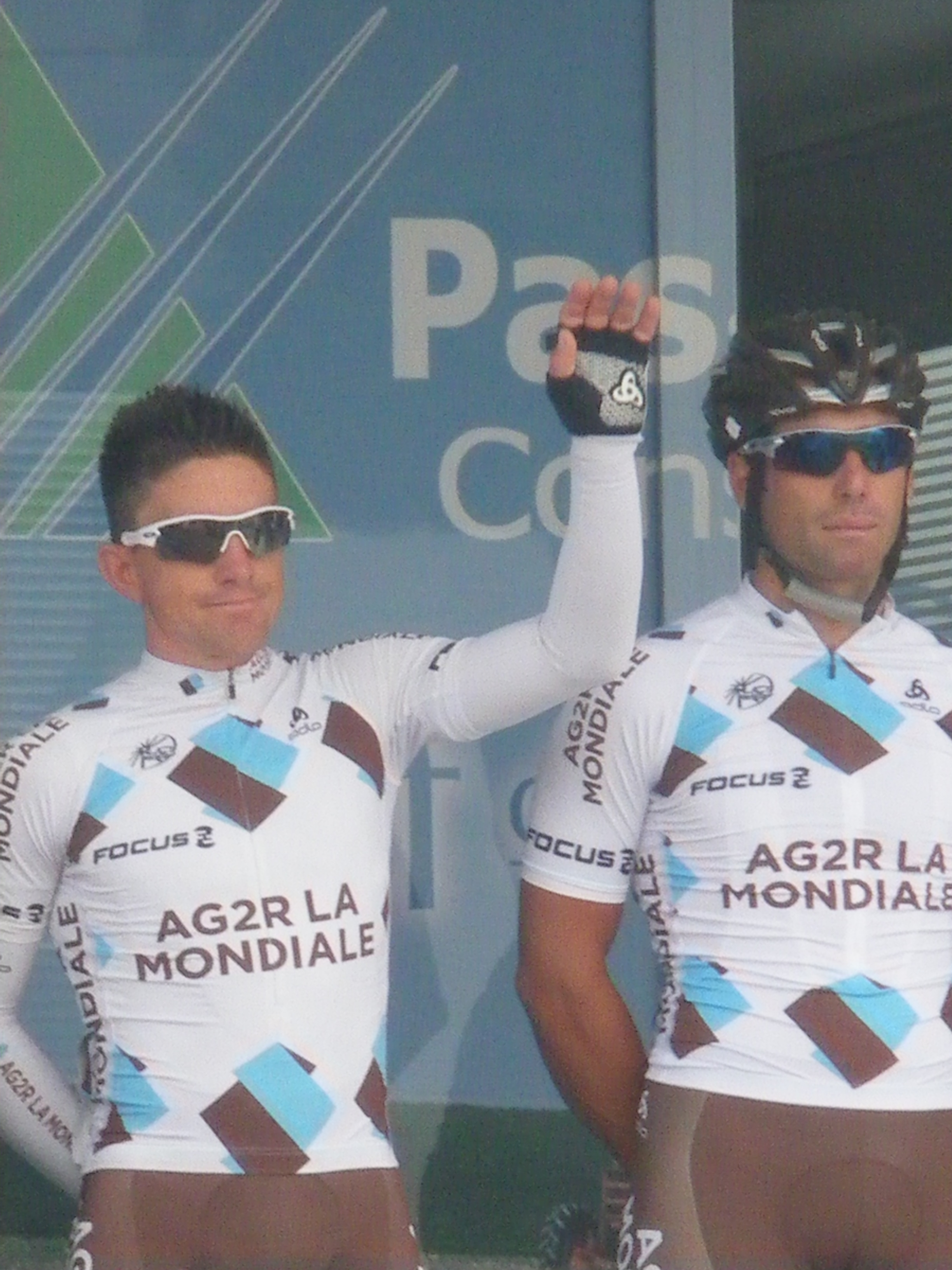 Samuel Dumoulin (à gauche) et Davide Appollonio (à droite) lors du Grand Prix d'Isbergues 2013.